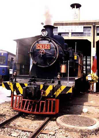 臺灣彰化扇形車庫靜態保存的CK101。